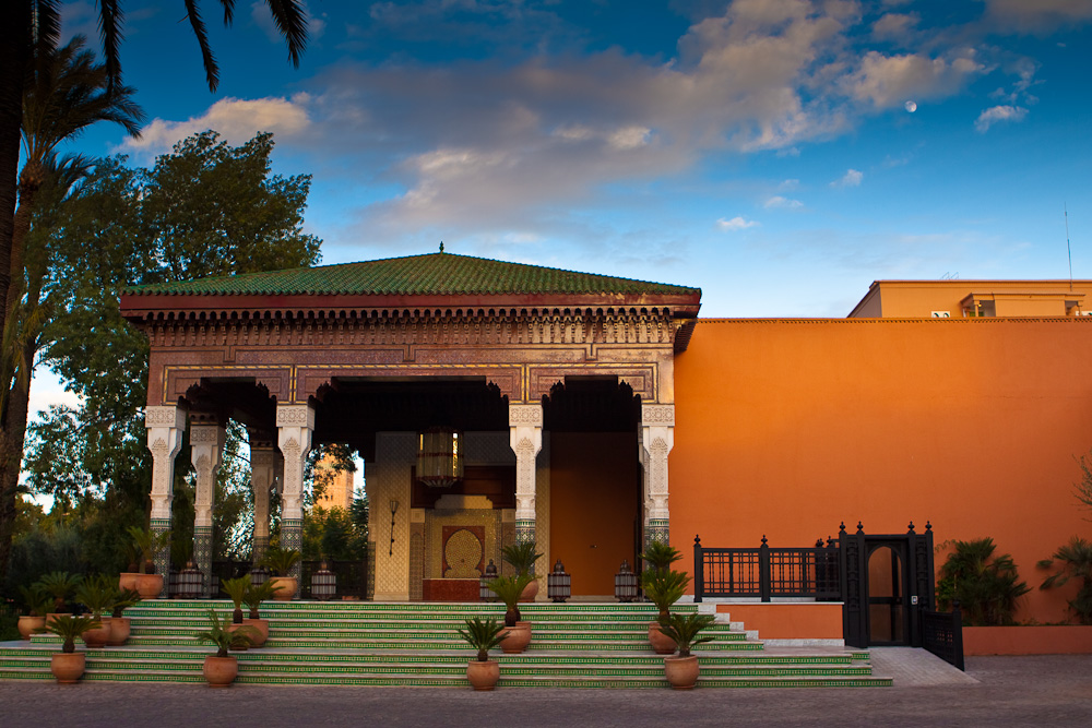 Entrée de l'hôtel La Mamounia à Marrakech